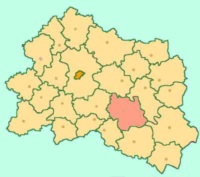 Orel Oblast map by Al Silonov Карта районов Орловской области